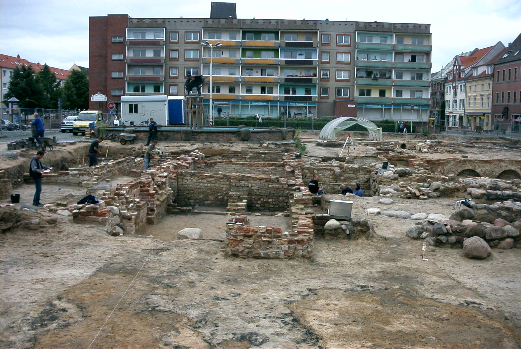 Ausgrabung Anklamer Markt 2003